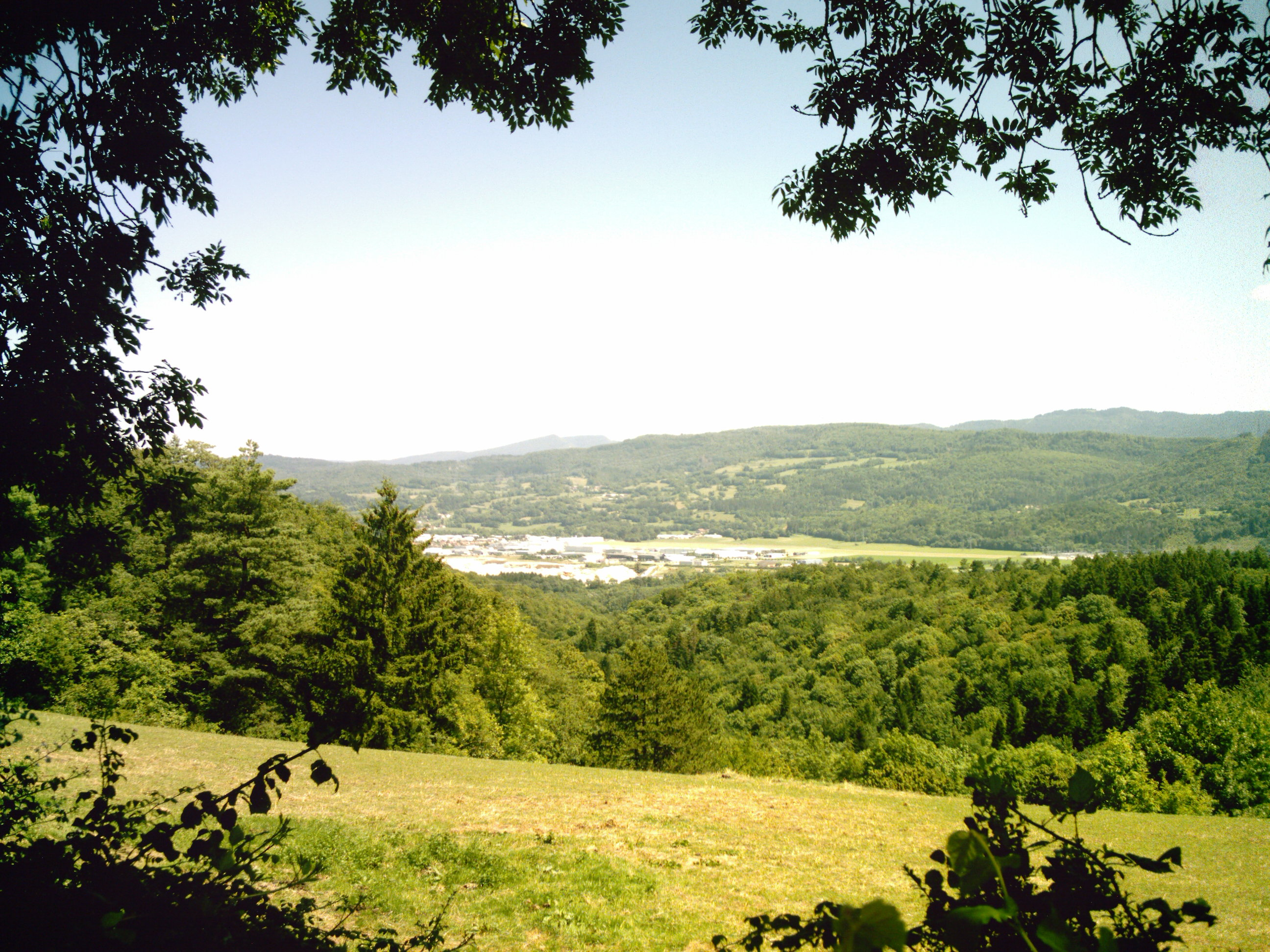 Izernore, au cœur de la vallée